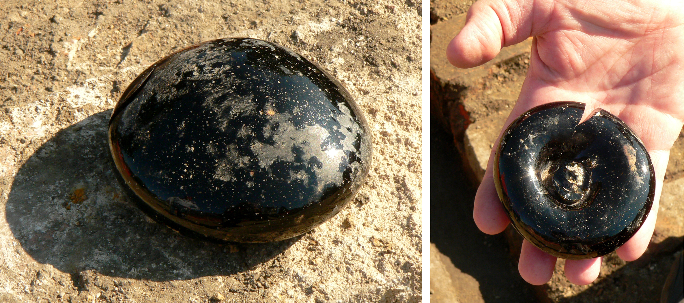 Ausgegrabenes Glättglas auf der Glashütte Klein Süntel, links Glättseite, rechts die Rückseite in der Hand zum Größenvergleich. Das Glättglas ist am Rand durch einen Riss beschädigt, vermutlich deswegen wurde es an der Glashütte zurückgelassen